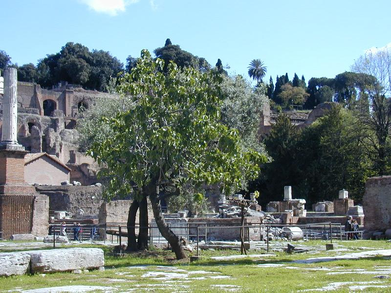 Roma, Foro romano: l'olivo, il fico, la vite by Lalupa